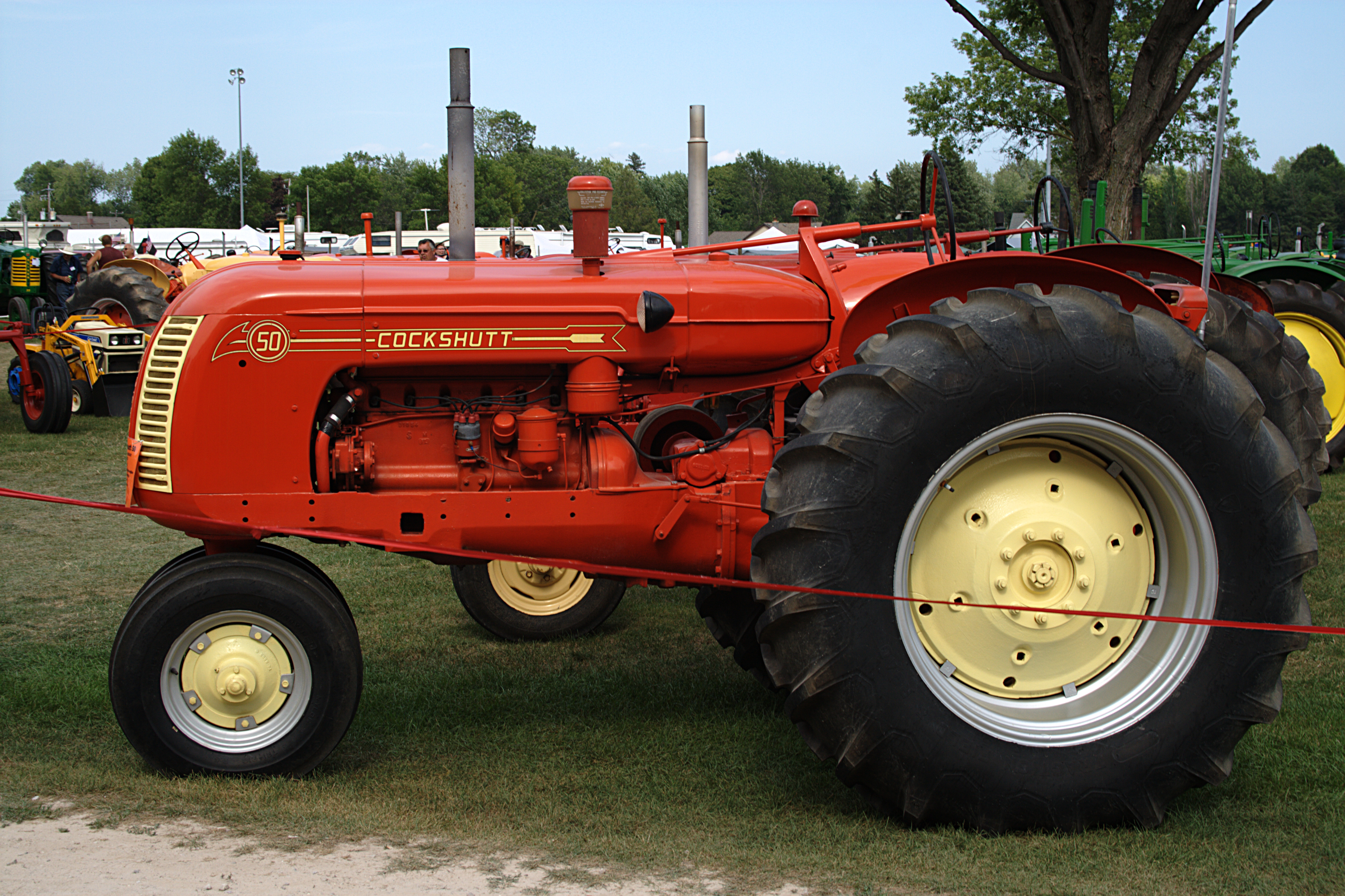 Cockshutt 50, Baujahr 1955